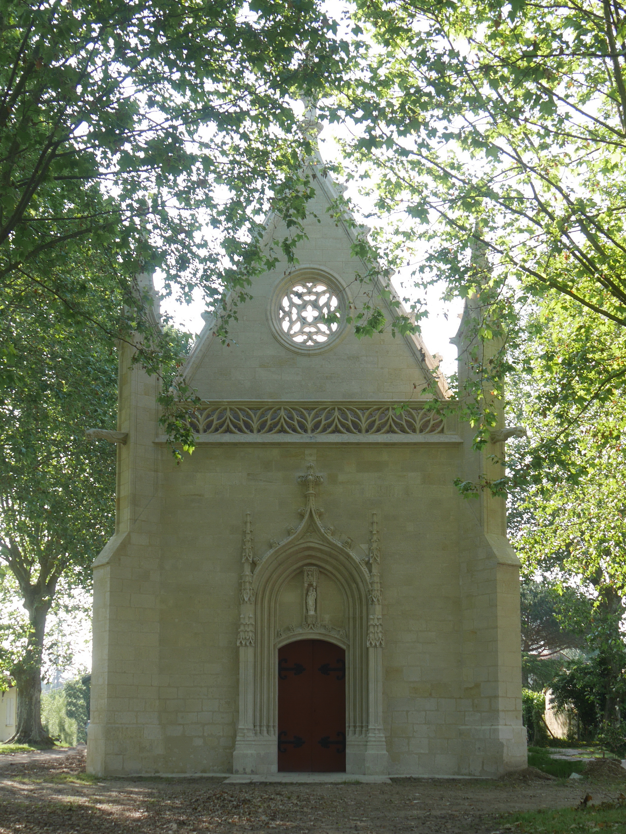 Chapelle de Condat façade restaurée